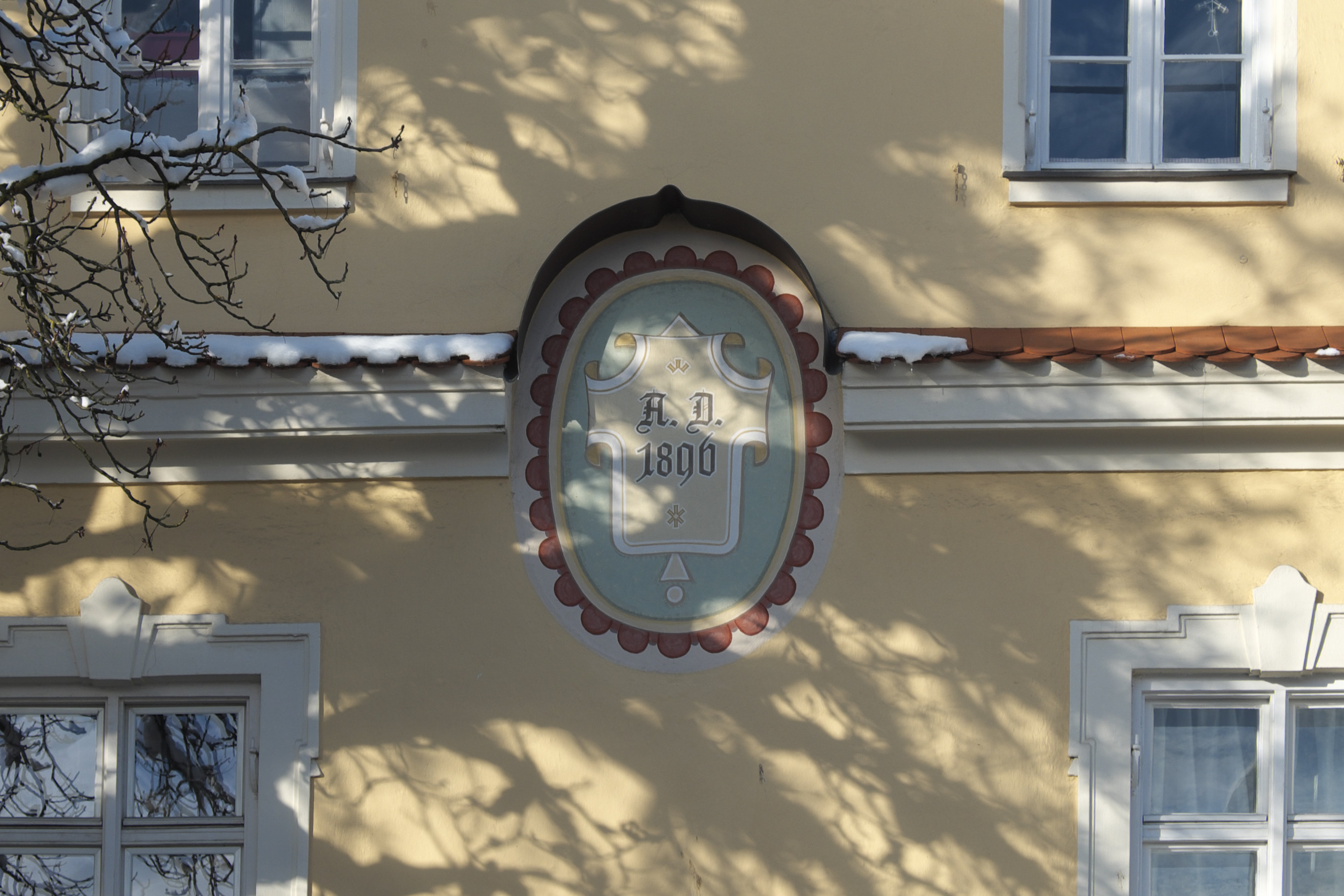 Wohn- und Geschäftshaus in der Gleichmannstraße 7 in Pasing im Stadtbezirk Pasing-Obermenzing in München (Bayern/Deutschland), von 1896, Medaillon mit der Jahreszahl 1896